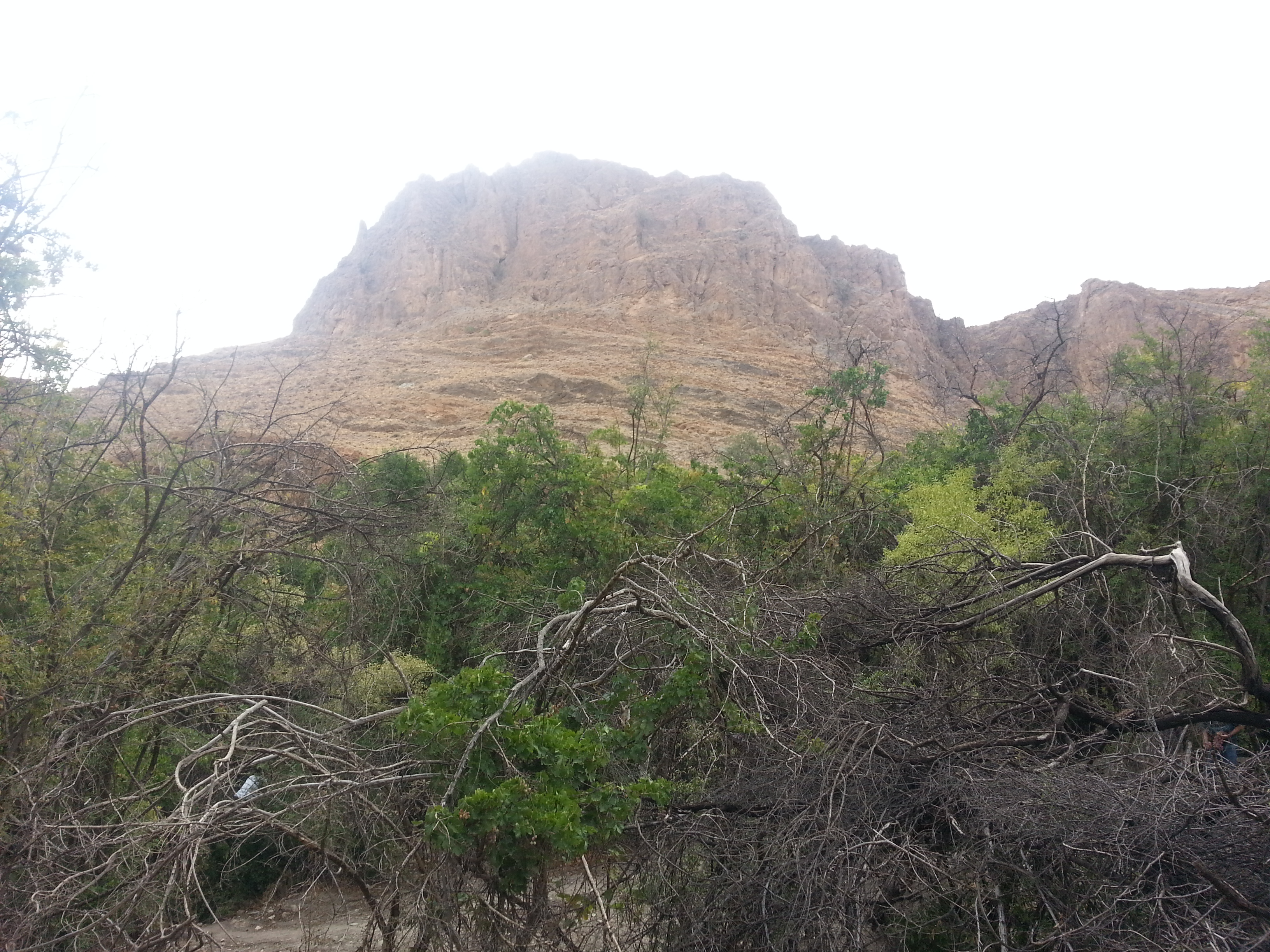 نمایی از باغات رُچان و خشکیدگی باغات بدلیل عدم رسیدگی مناسب